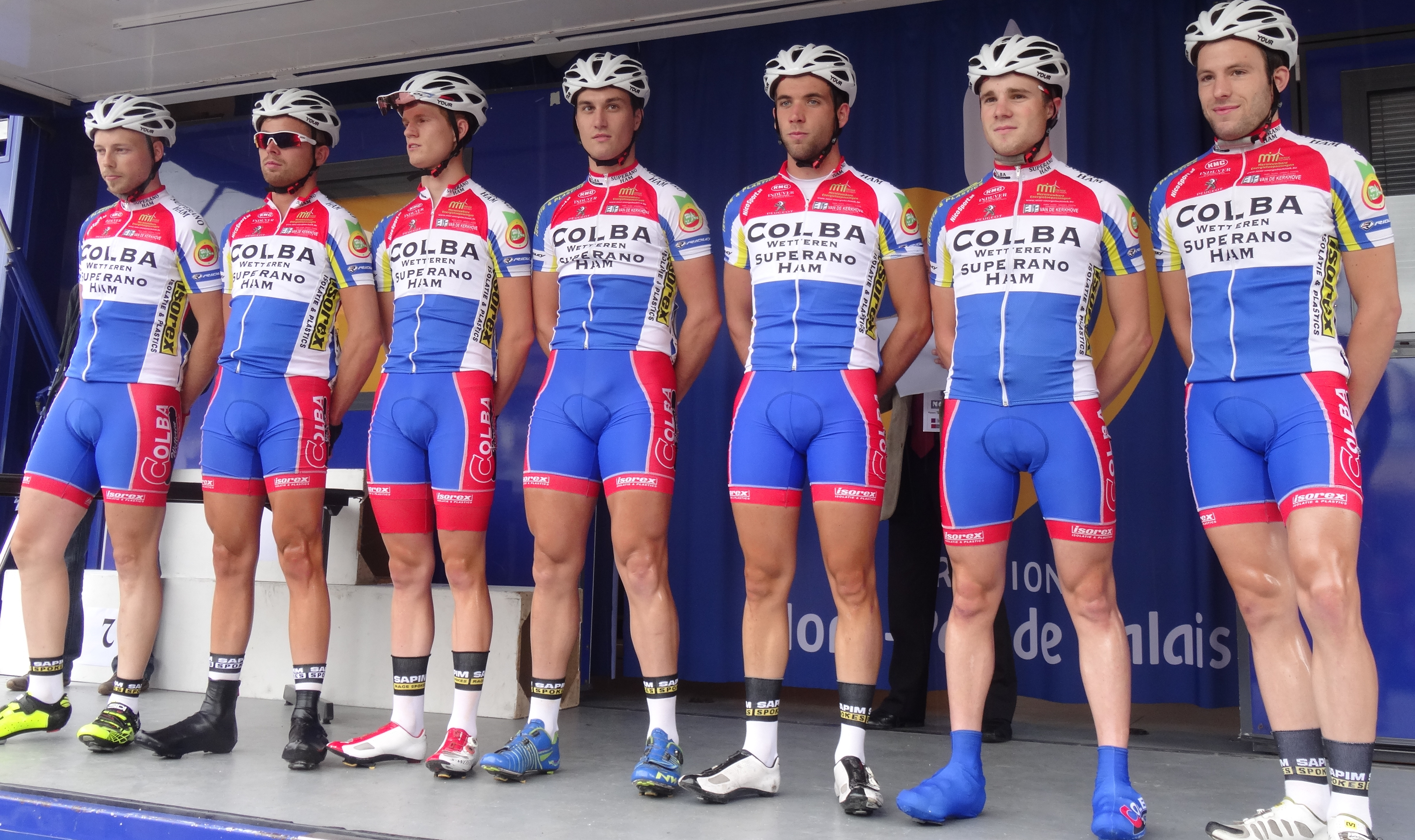 Reportage photographique réalisé le dimanche 13 juillet à l'occasion du départ et de l'arrivée de la Ronde pévéloise 2014 à Pont-à-Marcq, Nord-Pas-de-Calais, France.